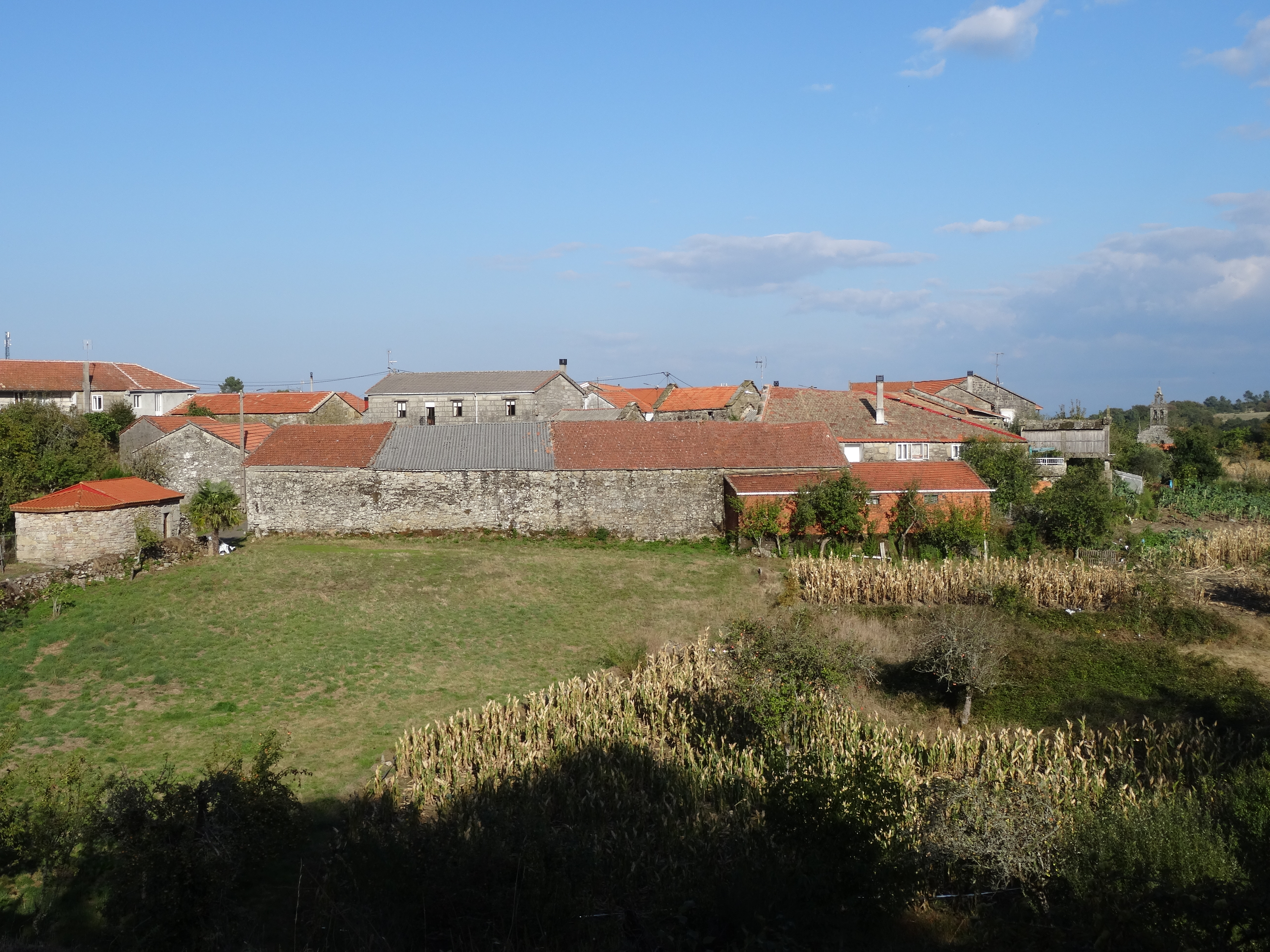 Ver título.